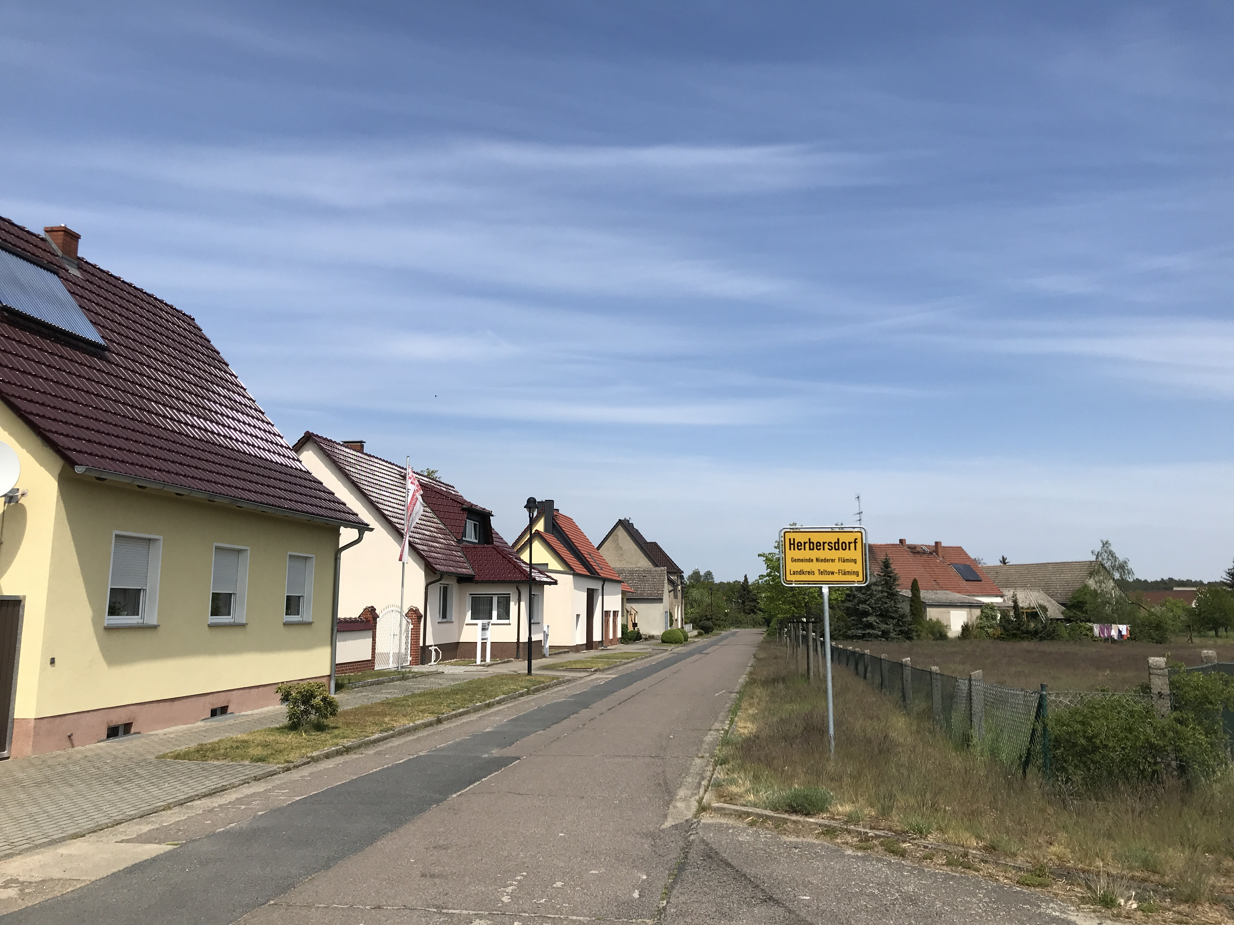 Hebersdorf, ein Ortsteil der Gemeinde Niederer Fläming in Brandenburg